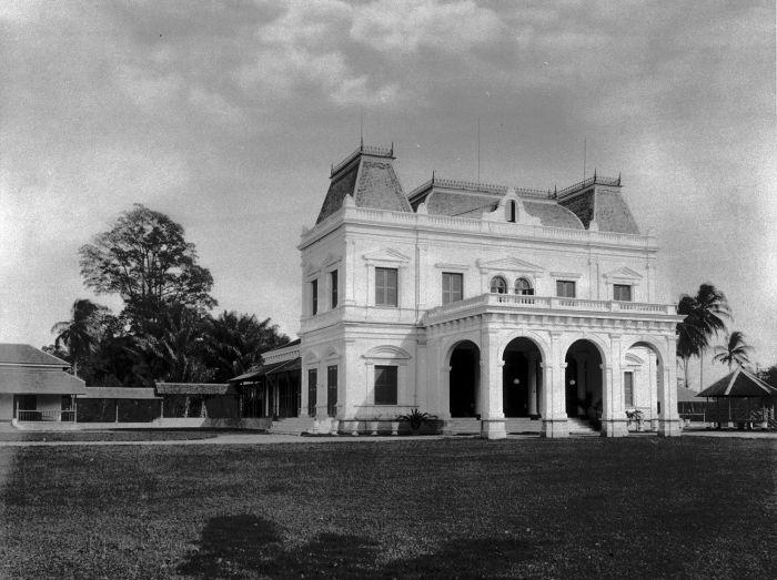 Foto. De woning van de Resident van de Oostkust van Sumatra, Medan